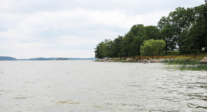 Sjön Yngaren vid Hagbyberga i Sörmland